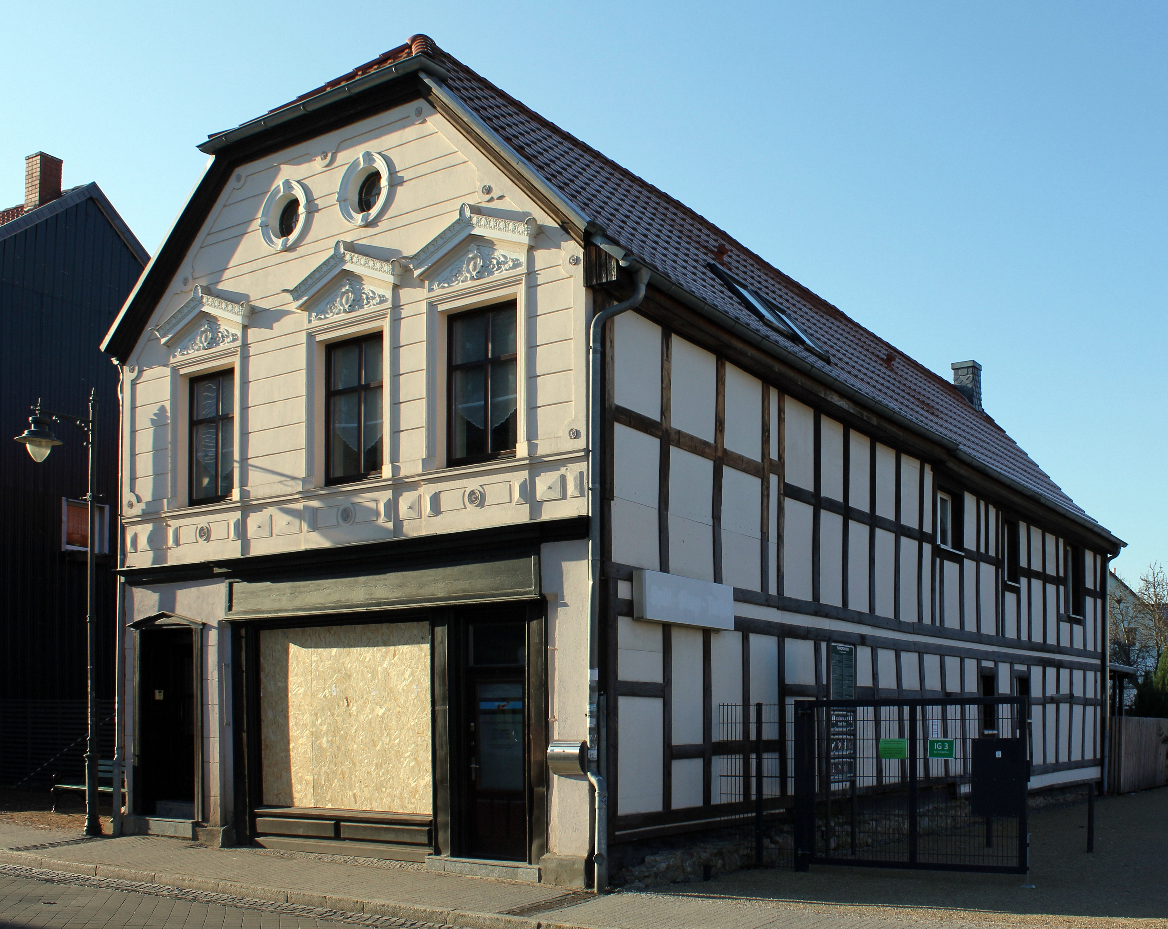 Wohn- und Geschäftshaus Breiter Weg 45 Burg (bei Magdeburg)